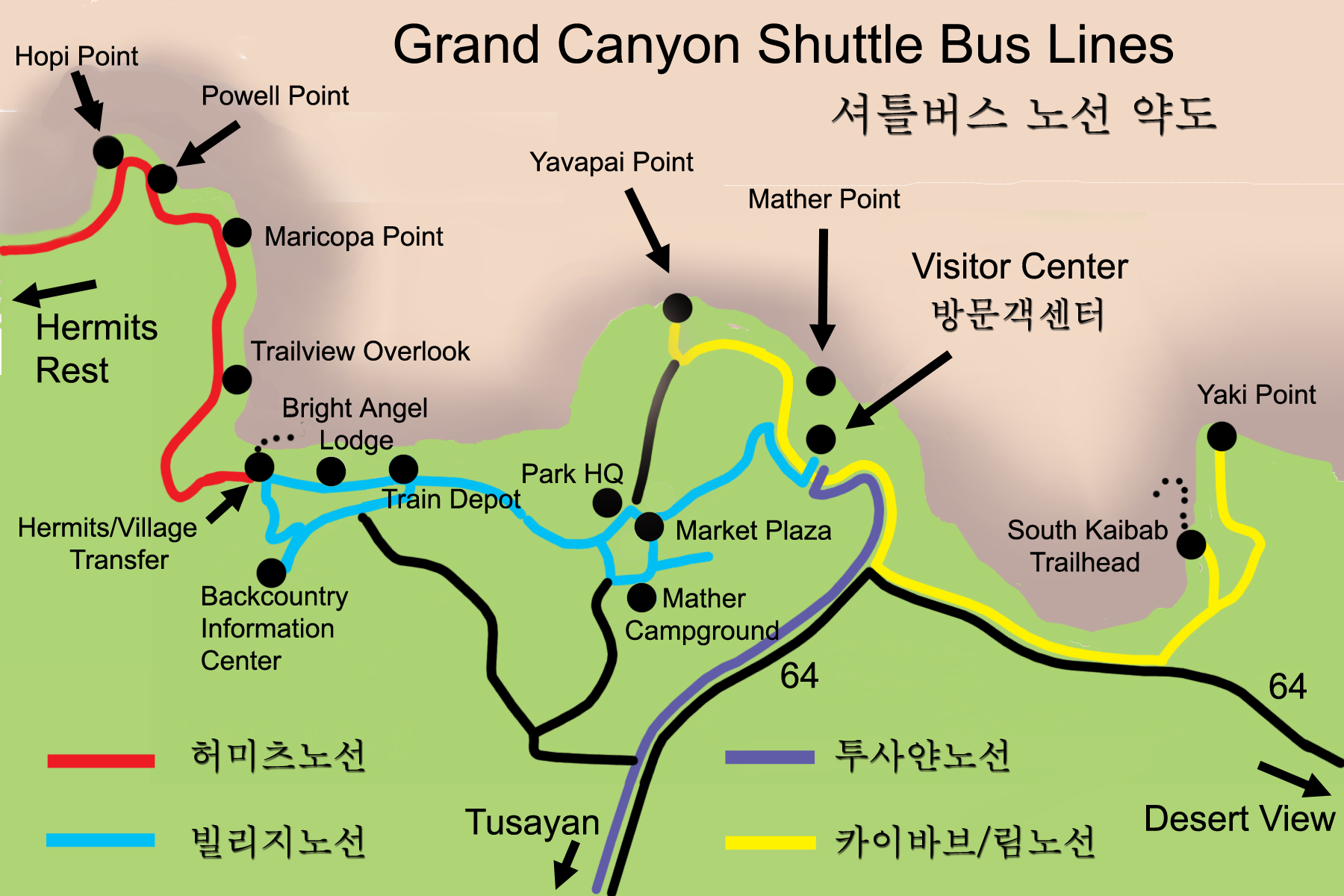 그랜드케니언 공원내의 셔틀 버스노선 안내도